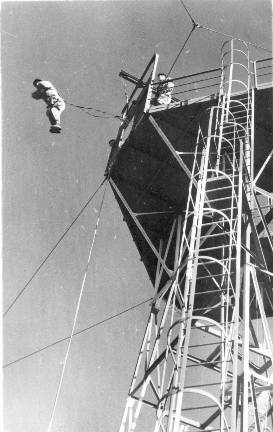 Tour d’entraînement pour le saut en parachute, se situant à l'ETAP.